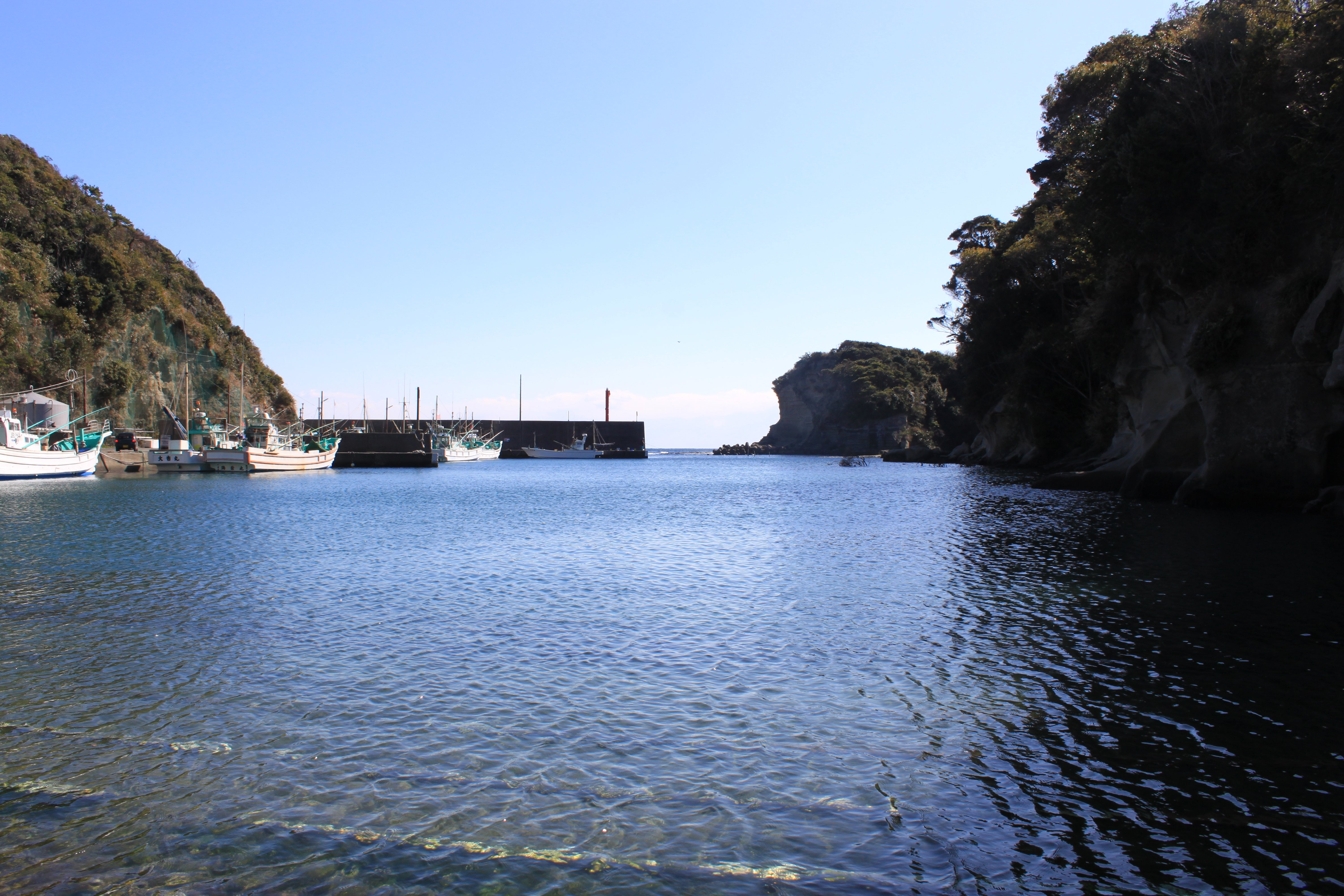 鵜原漁港